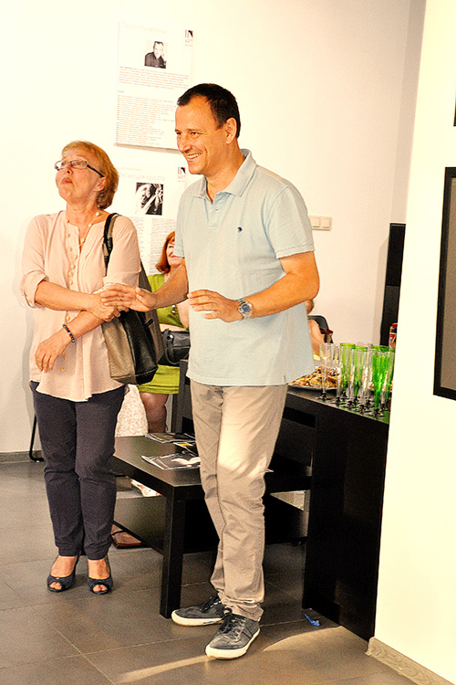 Паоло Мизерини